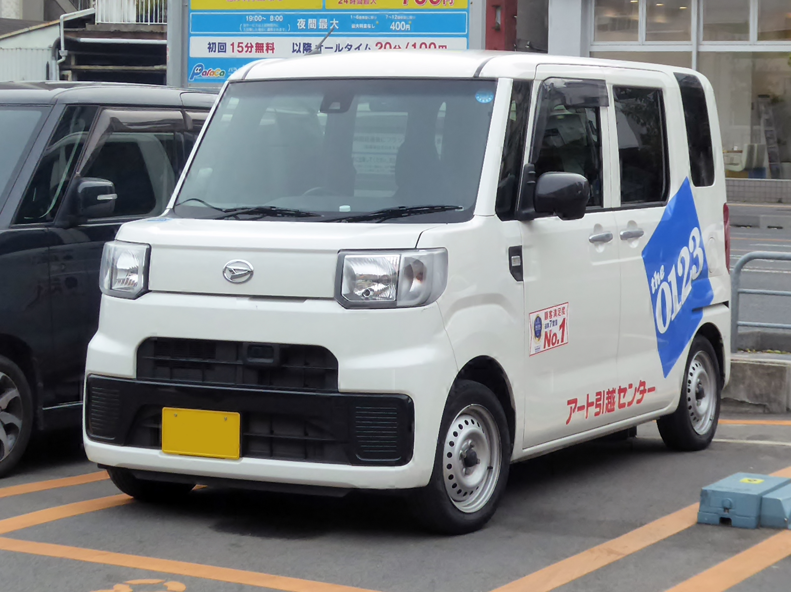 HBD-LA700V-GBDF型ダイハツ・ハイゼットキャディーD"SA III"のアート引越センターの業務車両をフロントから撮影。